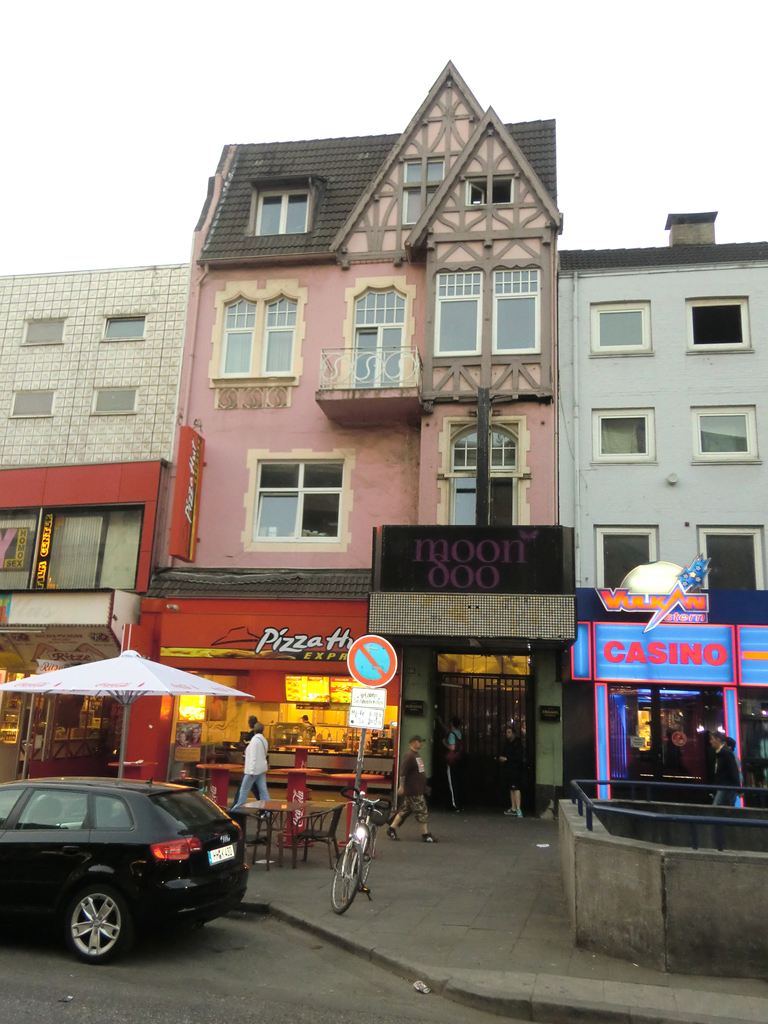 Ehemaliger Top Ten Club, Reeperbahn 136, ehemals Hippodrom. Eröffnung im November 1960 von Peter Eckborn; die Beatles spielten hier vom 01. bis zum 05.12.1960 ohne George Harrison. John Lennon bis zum 12.12.; am 27.03.1961 traten sie hier ihr offizielles Engagement an, ebenfalls 7 Tage in der Woche, 40 DM pro Tag. Tony Sheridan war hier Haussänger und hatte einen langfristigen Vertrag.